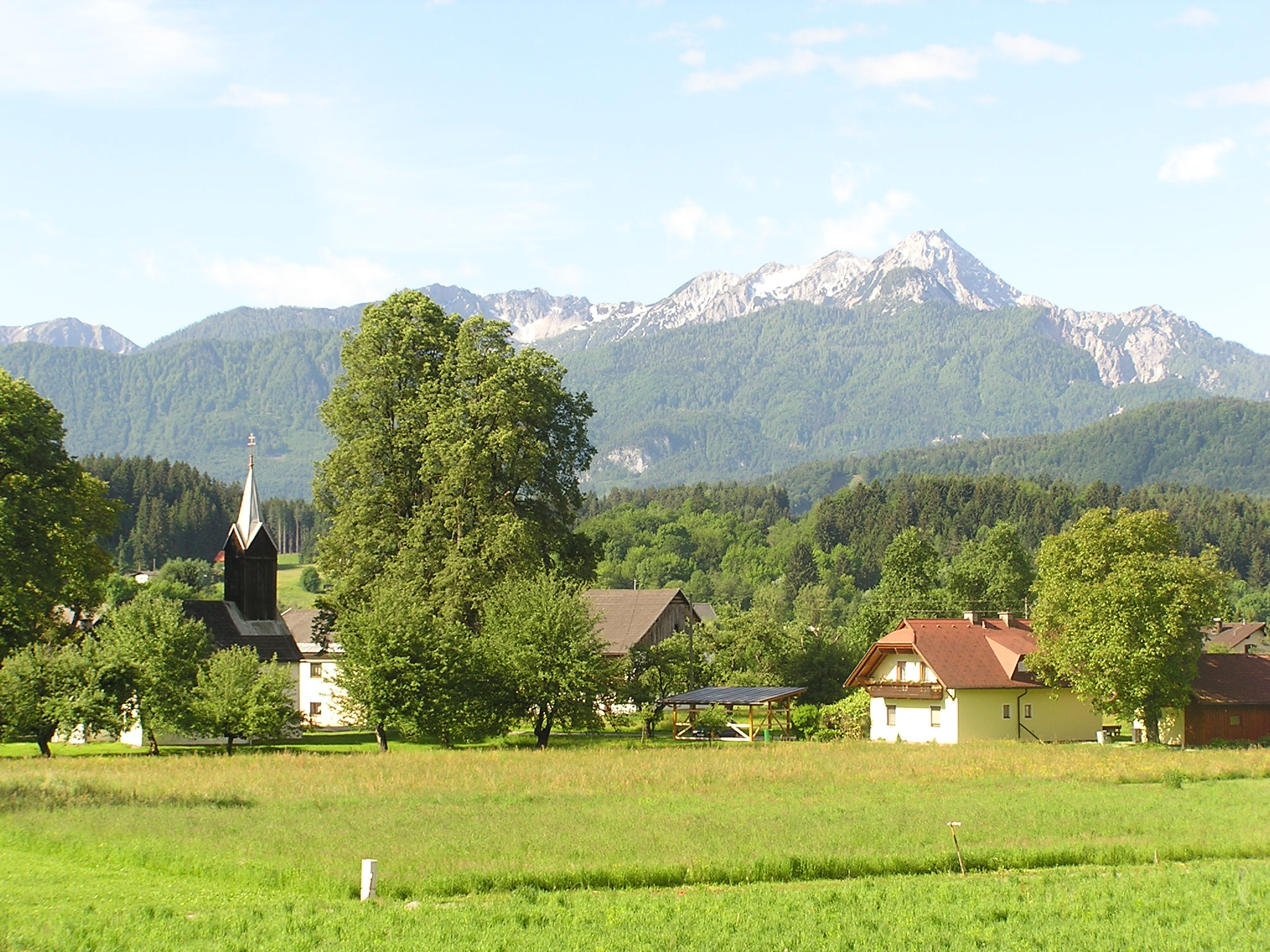 Blick von St. Lambrecht / Semislavče (Rosegg) in Richtung Karawanken (mit dem Mittagskogel). View from St. Lambrecht (Rosegg) towards the western Karawanken with its highest peak, the Mittagskogel (Kepa).